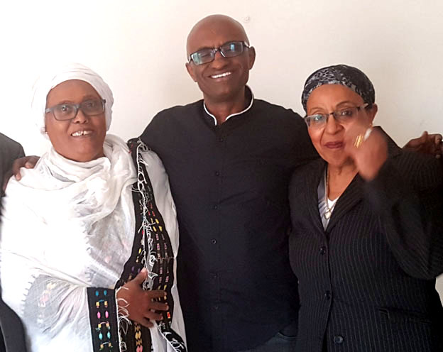 שמואל ילמה עם חרות טקלה ואסרסי גטו בכנס השלישי של פורום ירוסלם, שנערך בסינמטק תל אביב